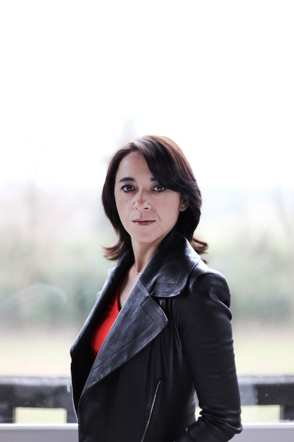 Portrait d'Emmanuelle Vo-Dinh